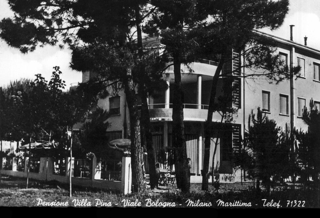 L' Hotel Villa Pina è una delle prime ville costruite a Milano Marittima negli anni 40',trasformata poi in hotel è tutt' oggi aperta e funzionante mantenendo negli anni la stessa architettura degli anni in cui è stata costruita.